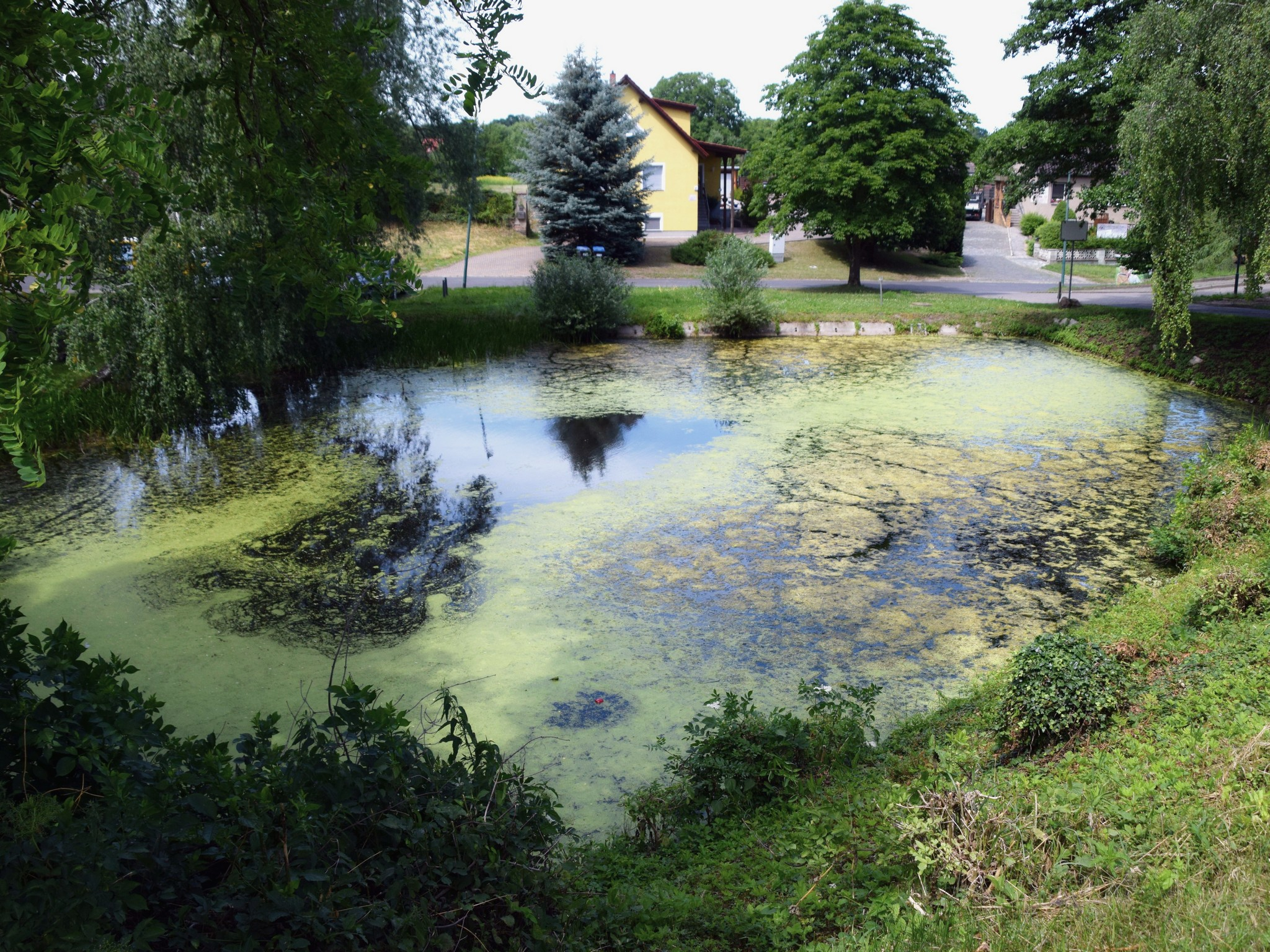 Teich an der Kehrwiederstraße in Frankfurt (Oder)-Güldendorf